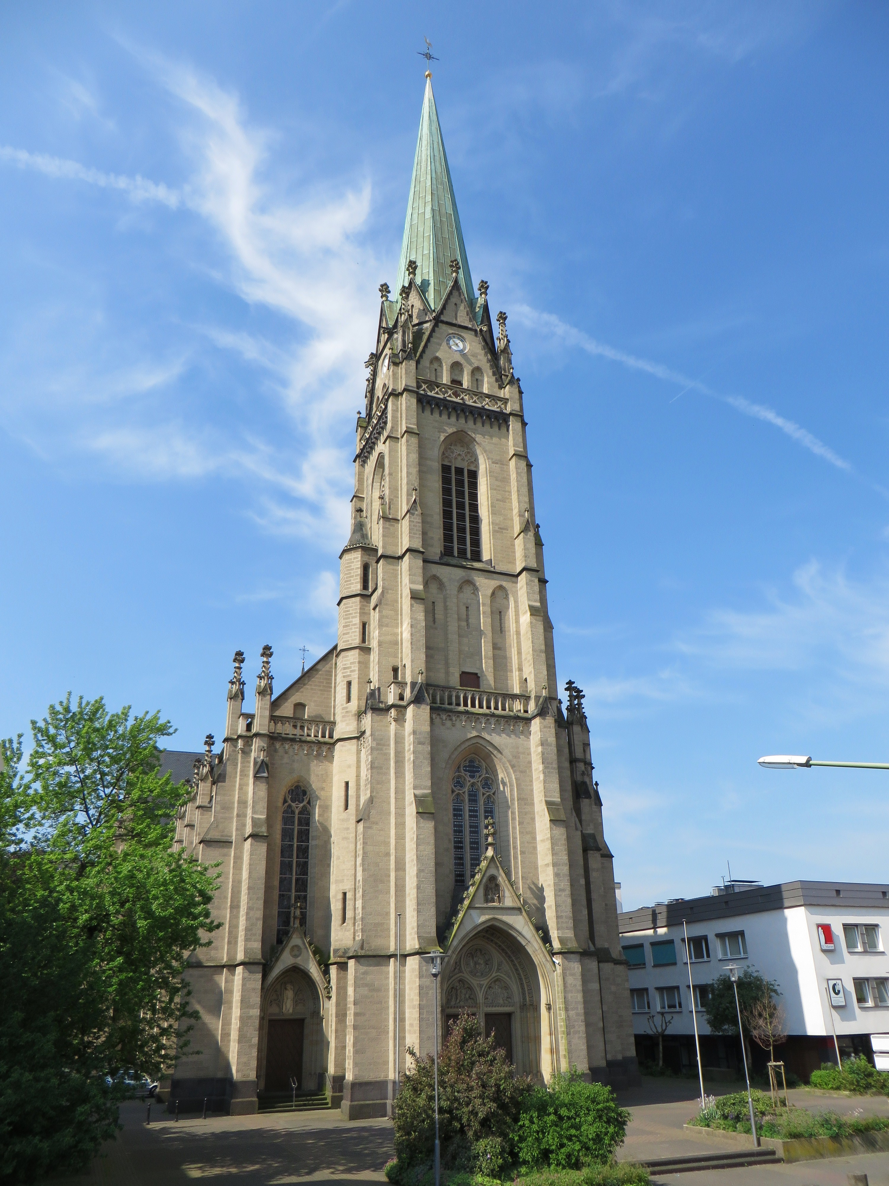 Denkmalgeschützte katholische Sankt Marien Kirche in Hagen, Hochstraße 81. Hagens größte Kirche ist eine dreischiffige Hallenkirche im neogotischen Stil, nach Plänen des Düsseldorfer Architekten Caspar Clemens Pickel 1892 bis 1895 erbaut. Einweihung war am 26. September 1895. Nach erheblicher Beschädigung im Zweiten Weltkrieg erfolgte 1954 der Wiederaufbau, dem sich in den darauffolgenden Jahren umfangreiche Restaurierungsmaßnahmen anschlossen. This is a photograph of an architectural monument.